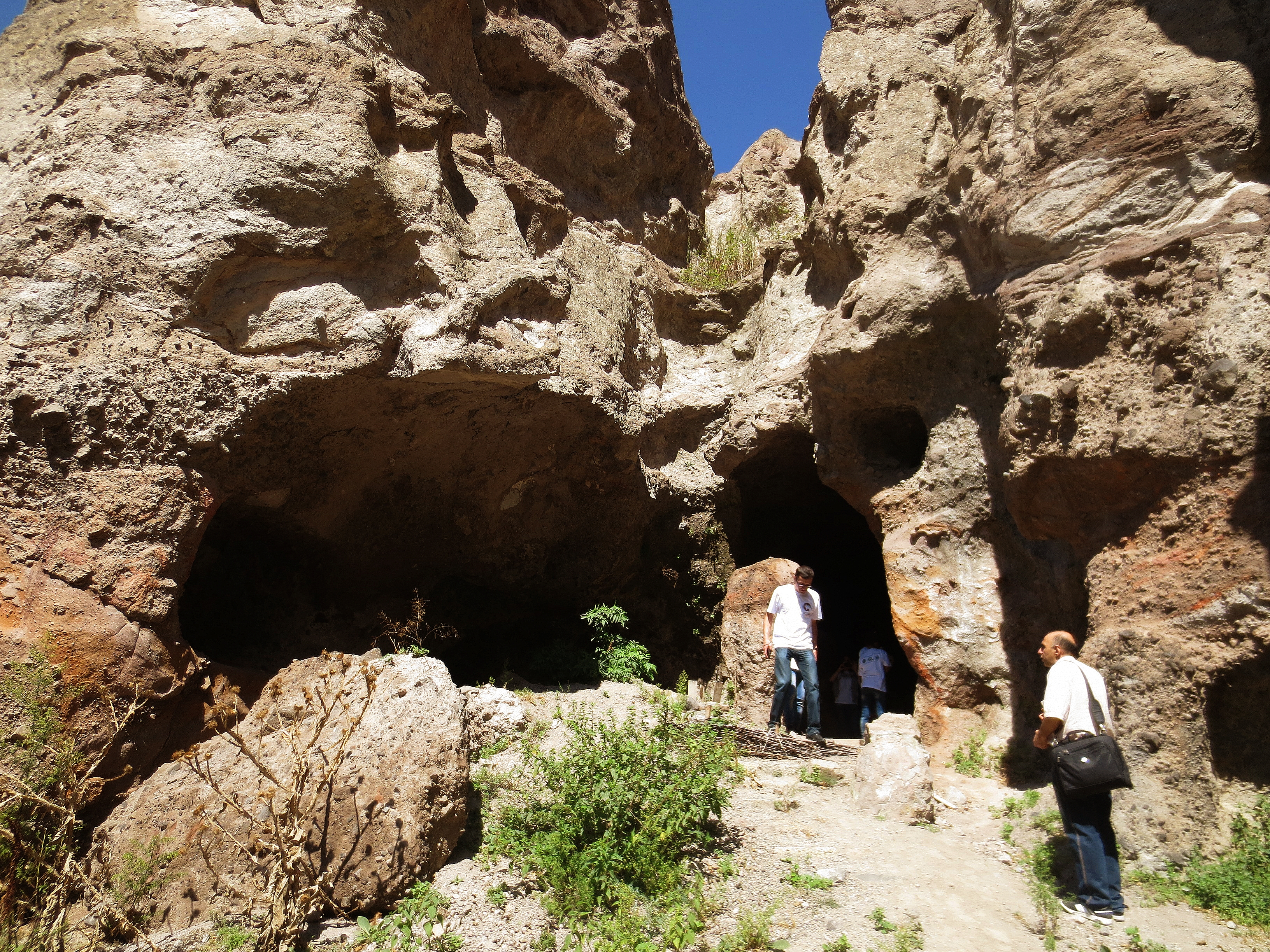 Ամֆիթատրոն Հին Գորիսում... ժայռափոր է, գործել է մինչև 20-րդ դարի սկիզբը 3/2.77